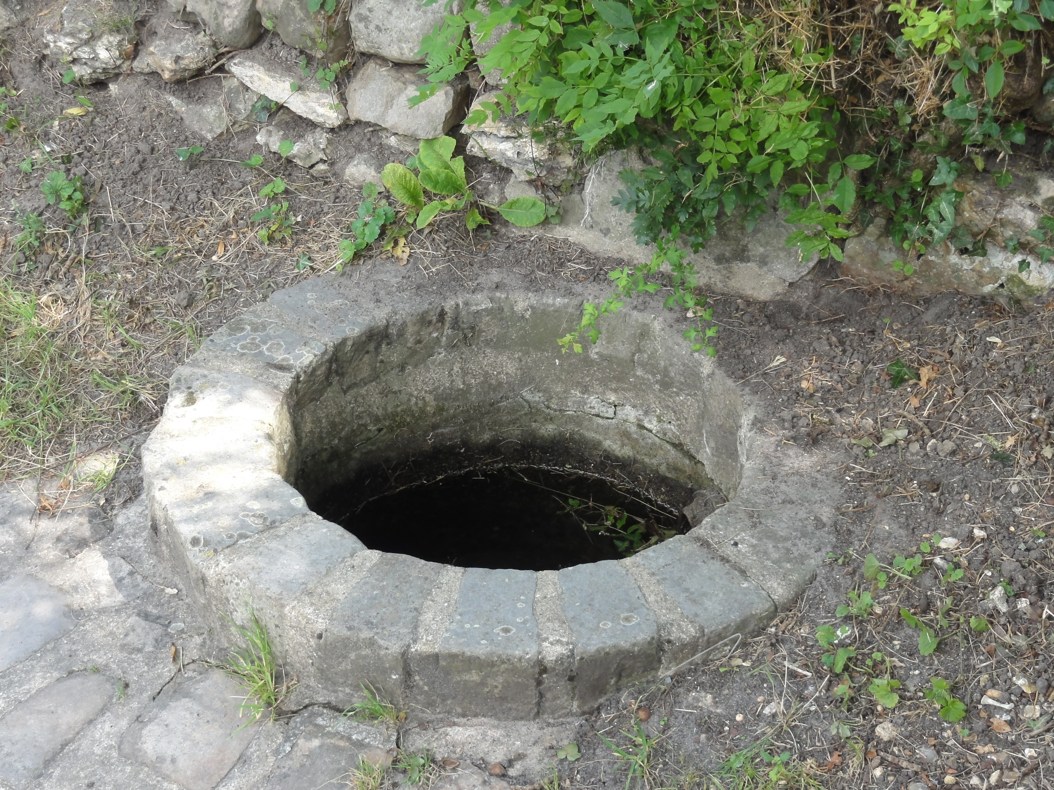 Voir titre.